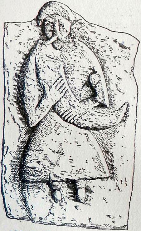 слов'янський намогильний камінь острову Руян, малюнок 8, сторінка 23